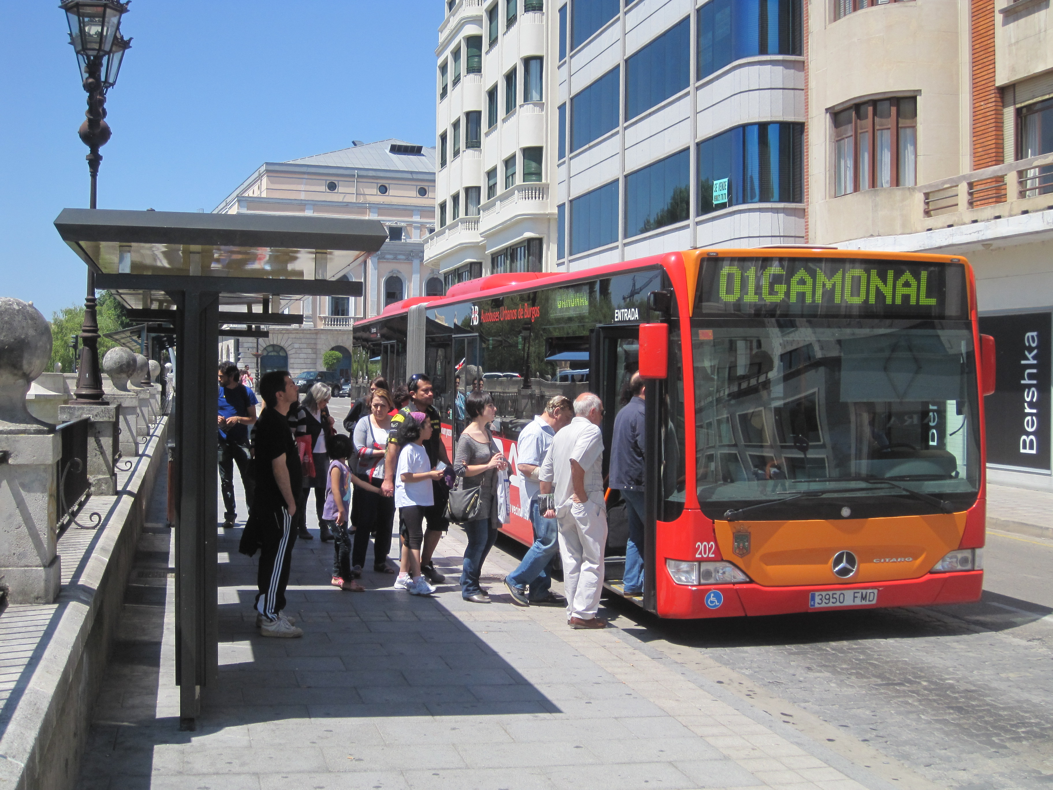 Gente subiendo al bus de la línea 1, que une la Avenida del Arlanzón con Gamonal.